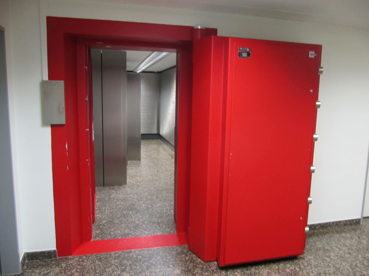 Tresorraum_Deutschland_4